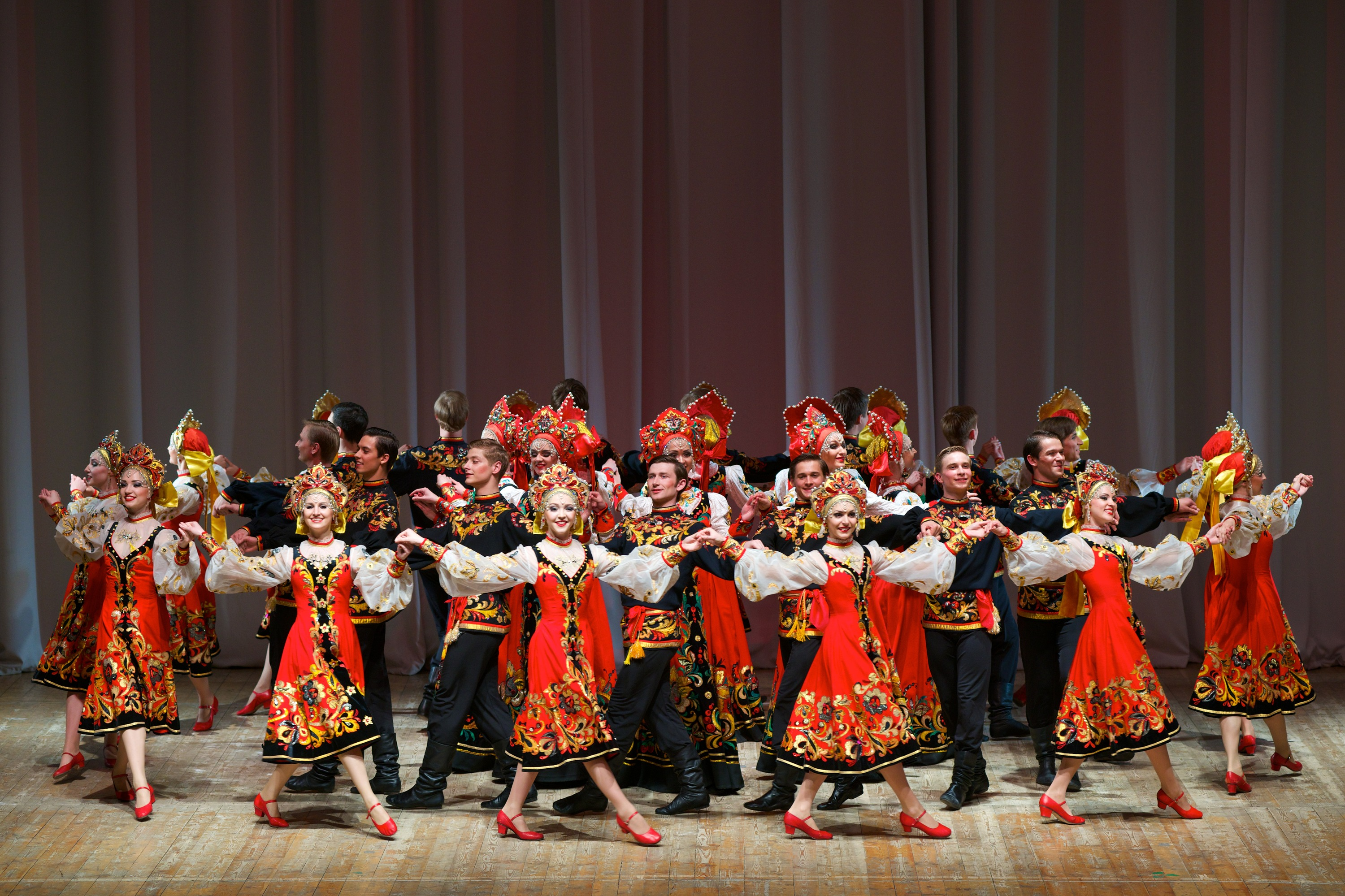 ГБУК г. Москвы «Московский государственный академический театр танца «Гжель»